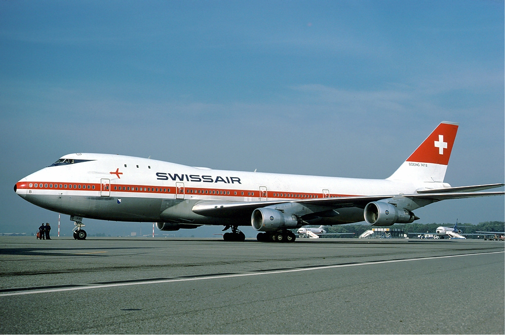 Swissair Boeing 747-200